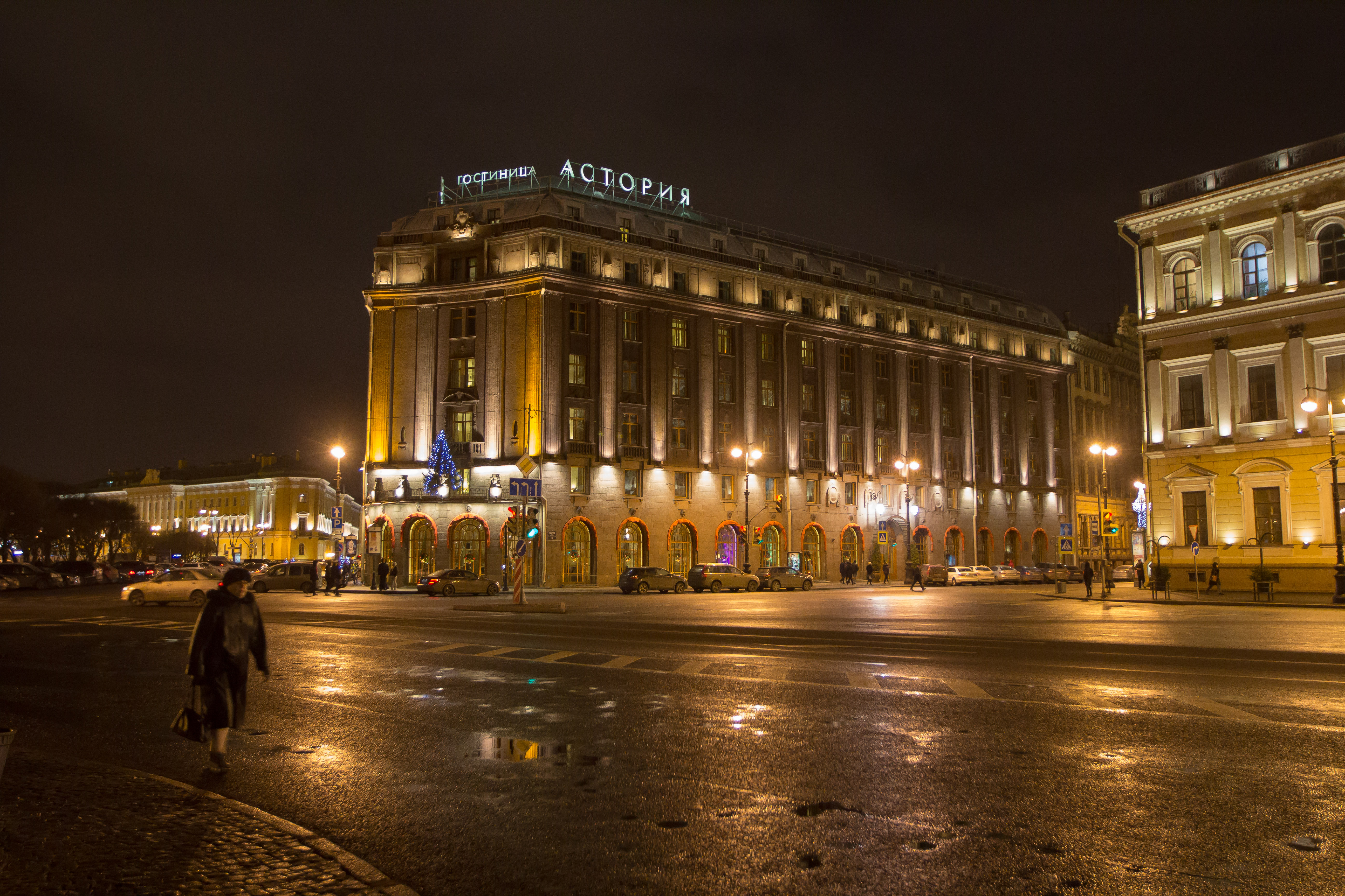 Hotel Astoria à Saint-Pétersbourg (Saint-Pétersbourg, Russie)